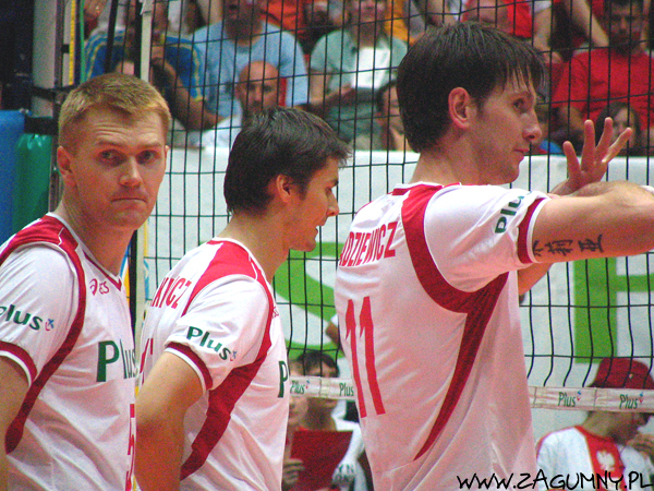 Paweł Zagumny, IV Memeriałim. Huberta Wagnera